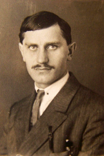 Ukrainian painter, Vasily Sedlyar (1899-1937)